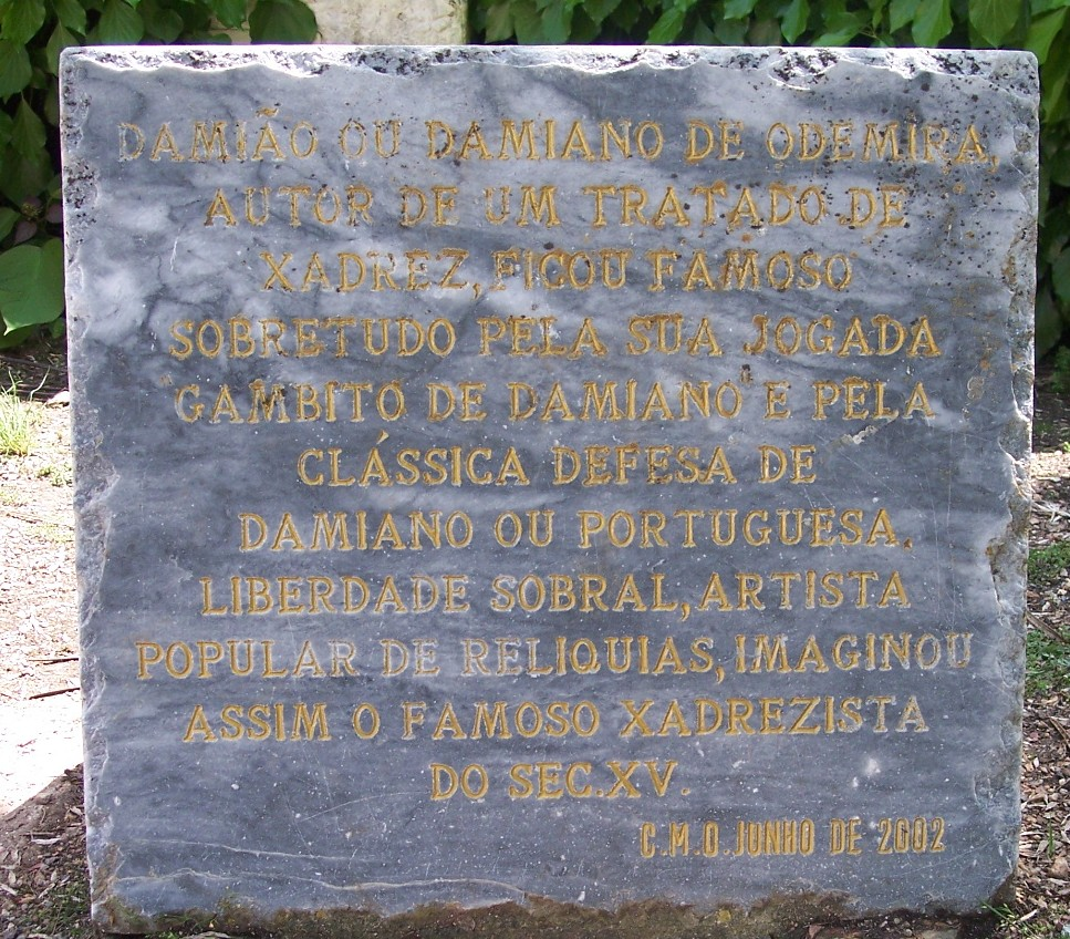 Gartenanlage in Odemira/Pt: Steinplatte mit Erläuterungen